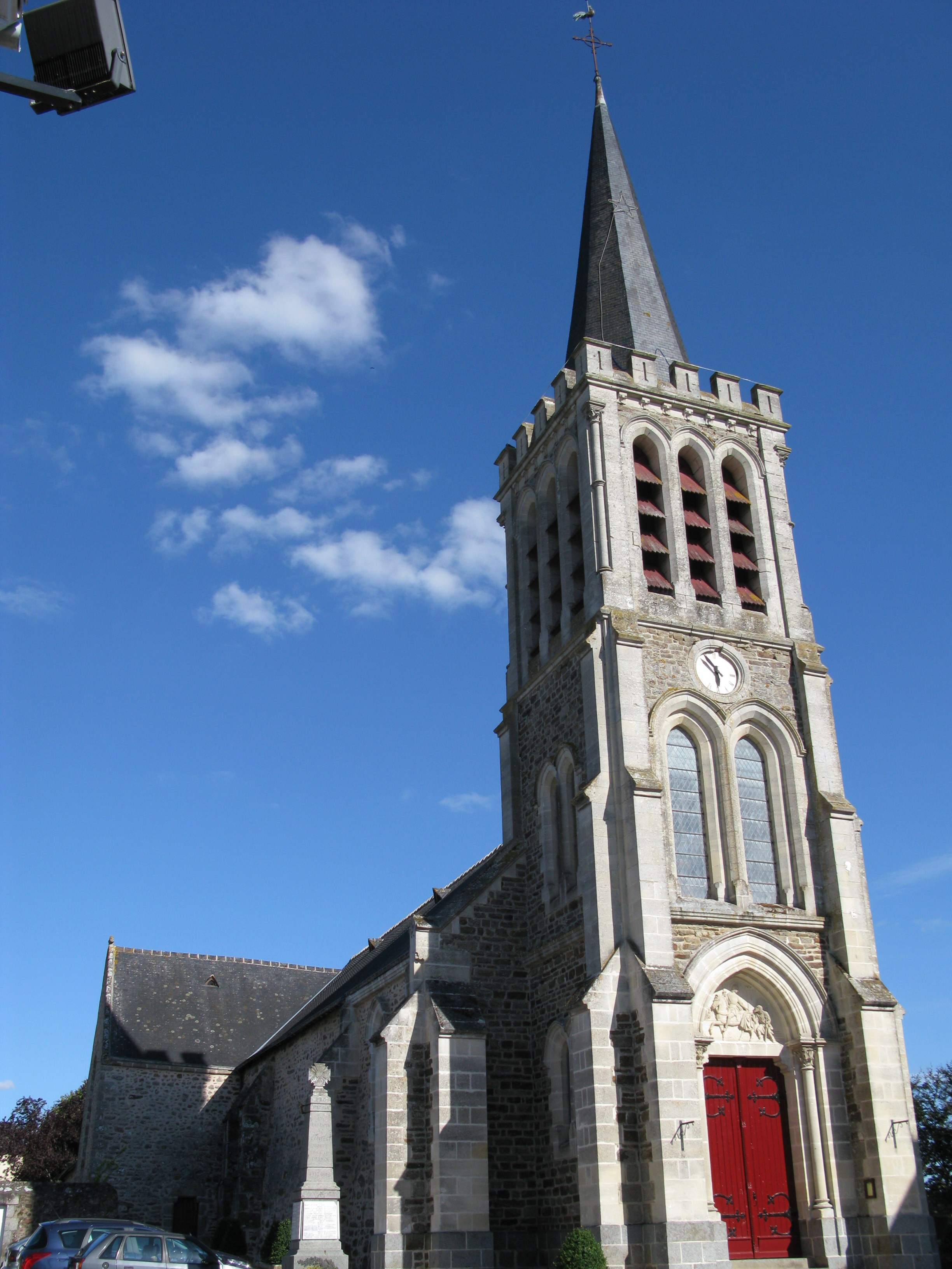 église de Contest